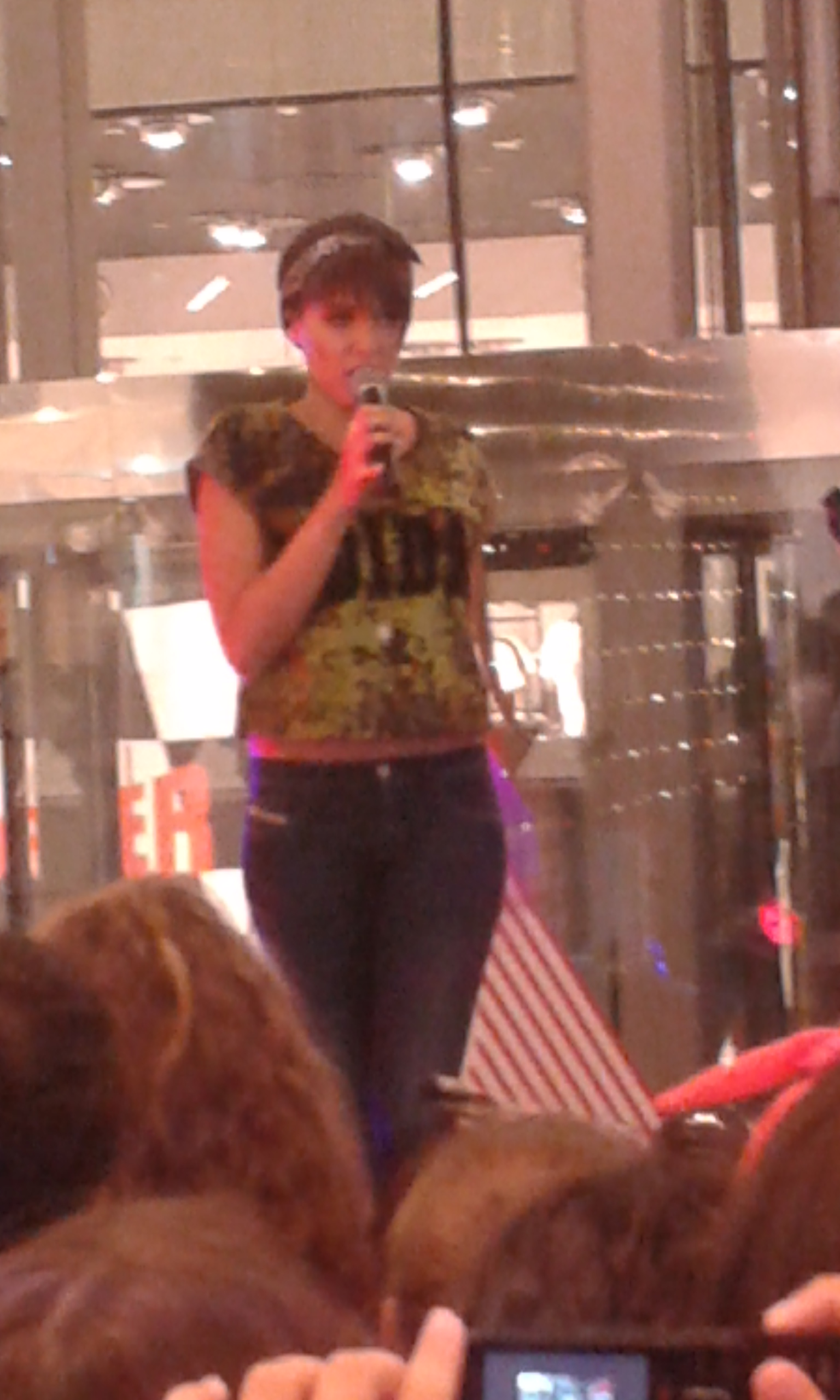 Сара Јовановић на концерту у крагујевачком тржном центру „Плаза“. Наступ је уприличен у 20.00 у суботу, 23. августа 2014, у оквиру манифестације Family Shopping Fest.